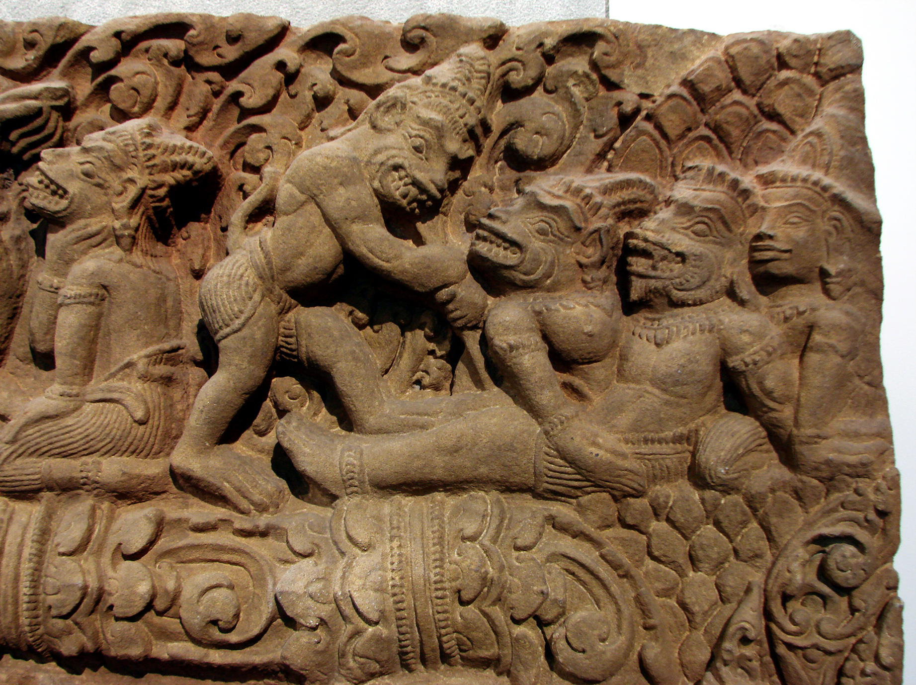 Linteau représentant un épisode du Ramayana: ici, la mort de Valin. Cambodge, province de Battambang, Vat Baset, style du Baphuon, 11ème siècle. Grès.Musée Guimet, Paris.